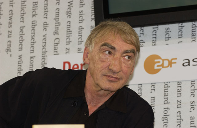 Gottfried John. Dieses Fotos dürfen Sie honorarfrei nutzen, wenn Sie folgenden credit beachten: Copyright: Das blaue Sofa / Club Bertelsmann.